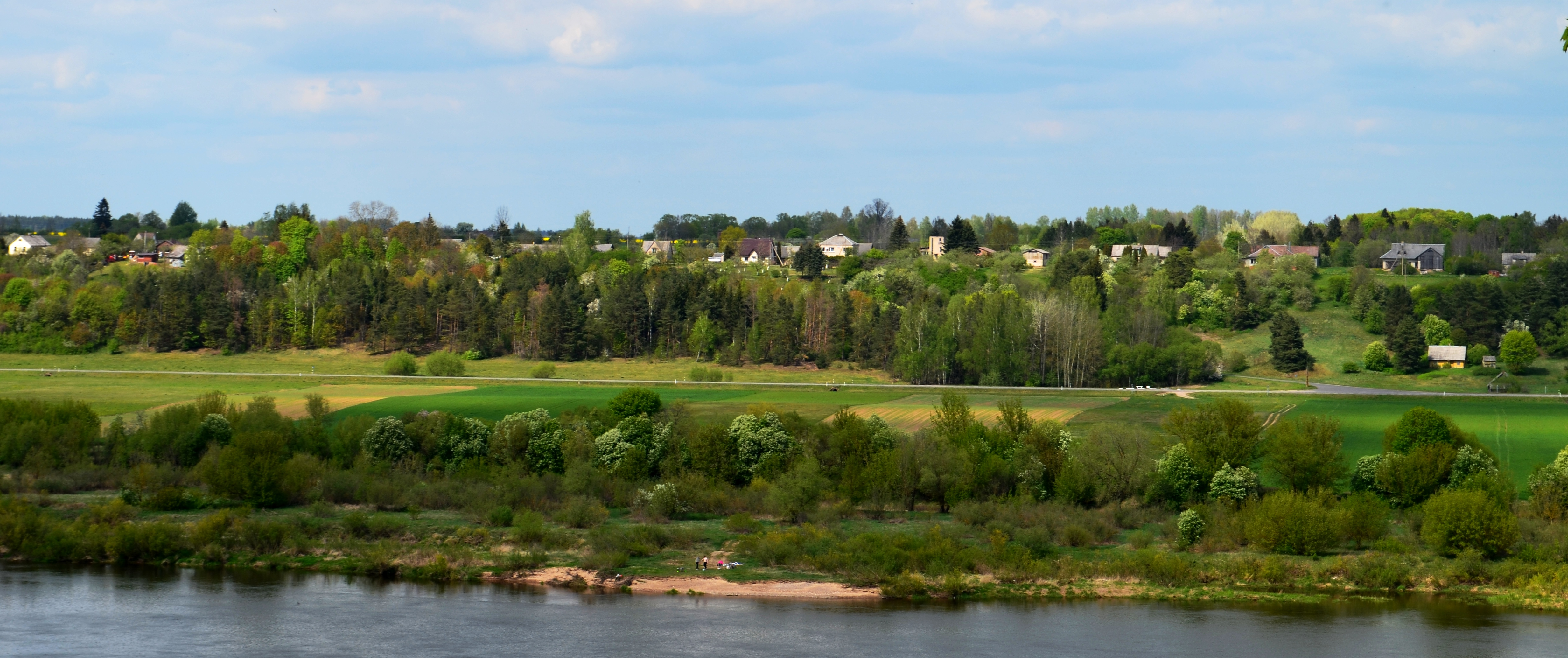 Klangiai (Jurbarko r.), žvelgiant iš Ilguvos (Šakių r.)